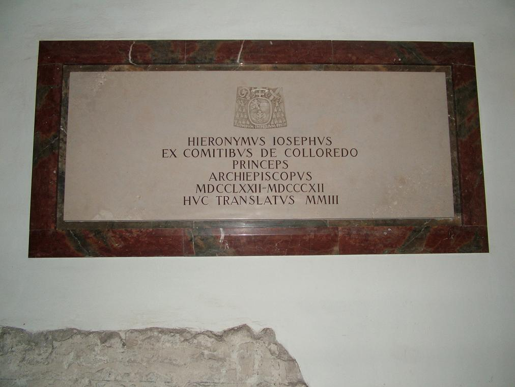 Grab Erzbischof Colloredo in SalzburgÜbersetzung:Hieronymus Josef aus dem Geschlecht derer von Colloredo.Fürst-Erzbischof1772−1812Hierher überführt 2003.